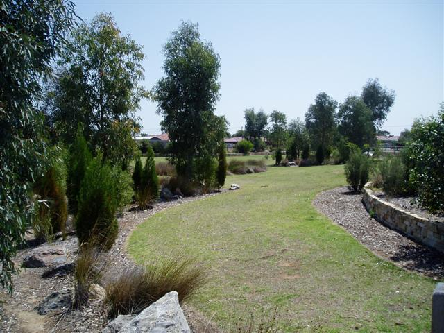 Mikawomma Reserve